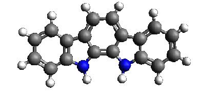 Indolokarbasooli molekuli pilt programmiga Avogadro